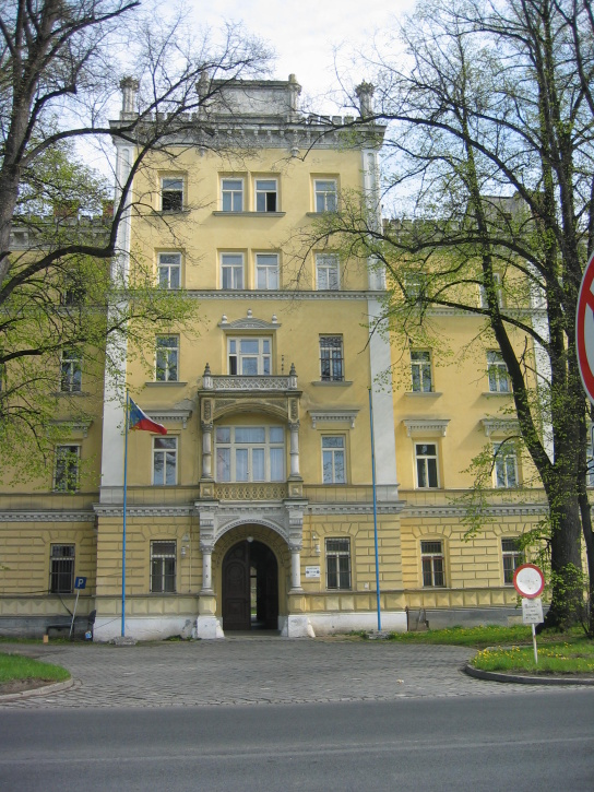 Česky: prostřední budova VA